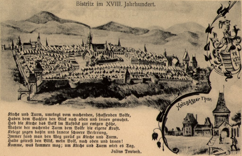 Bistriţa 18. sec